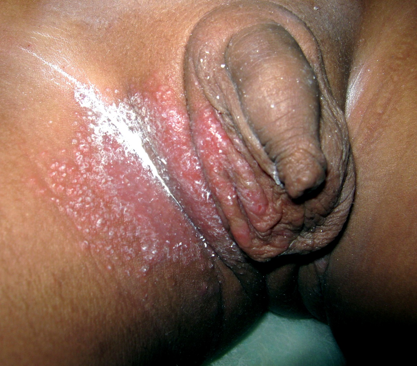 Dermatophytose des grands plis : dermatophytose inguino-crurale (anciennement dénommé eczéma marginé de Hébra) chez un enfant